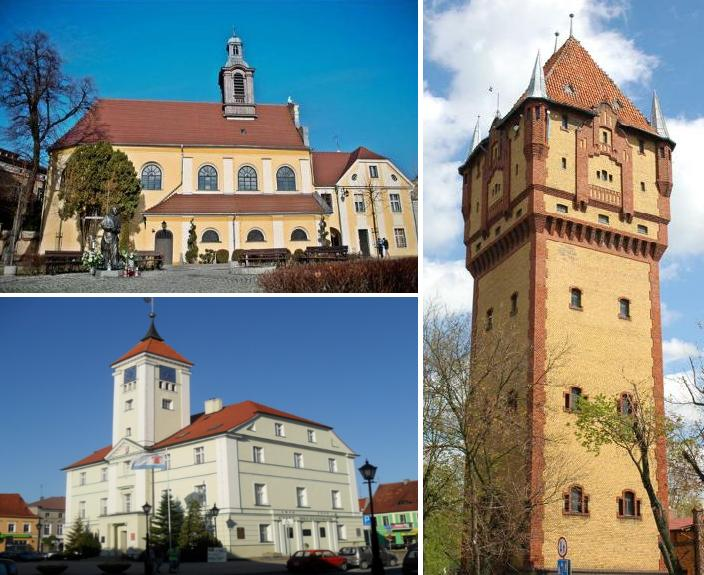 Kościan